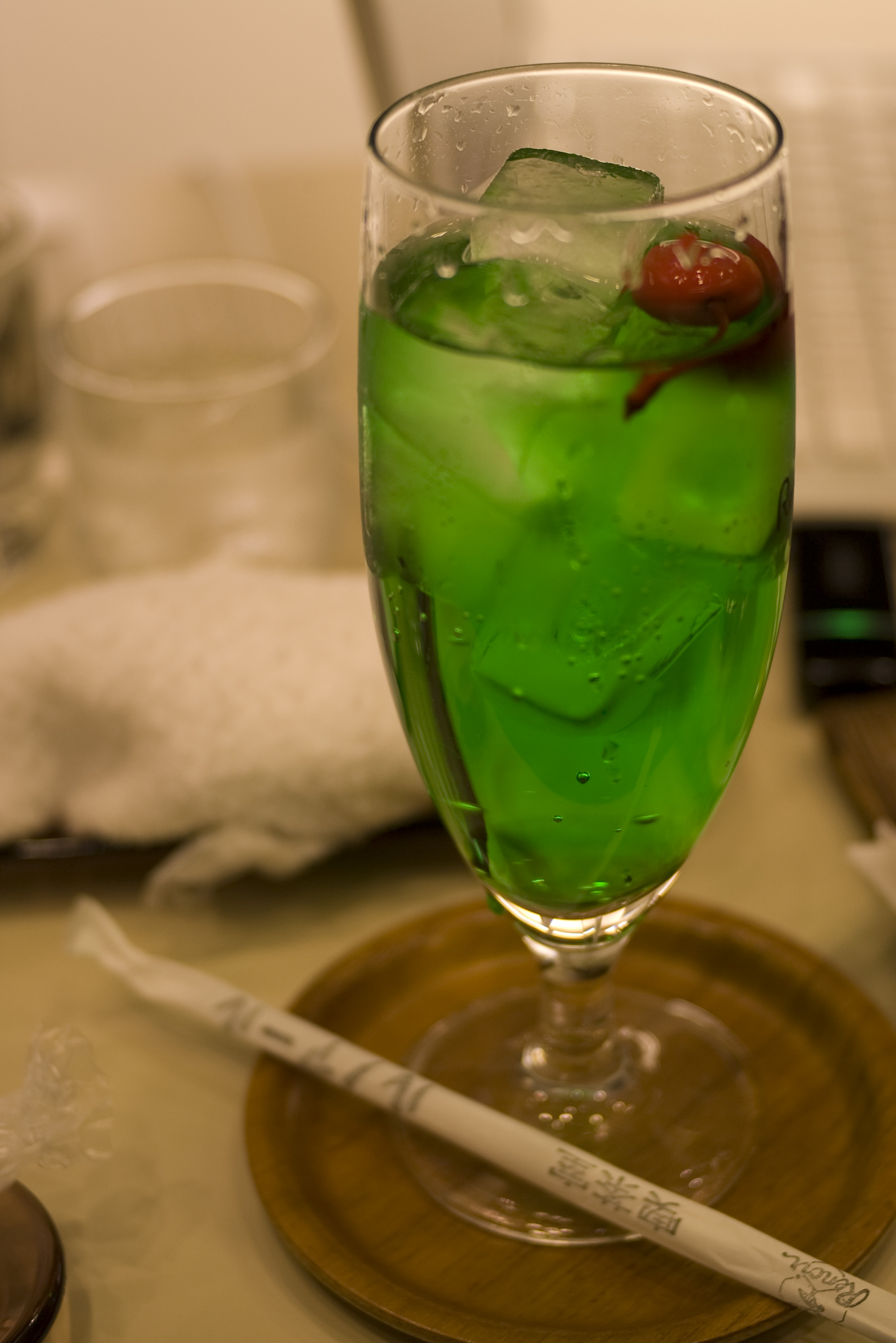 プチ打ち合わせ→打ち合わせ→プチ→打ち合わせ→プチ→打ち上げ、な4/27。最後はメロンソーダで十分です。